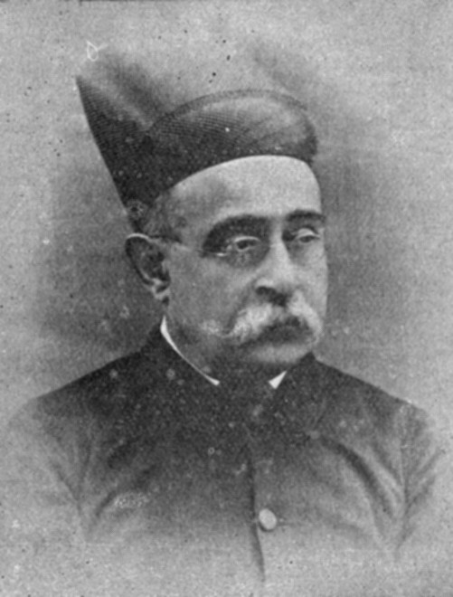 Dinshaw Wacha